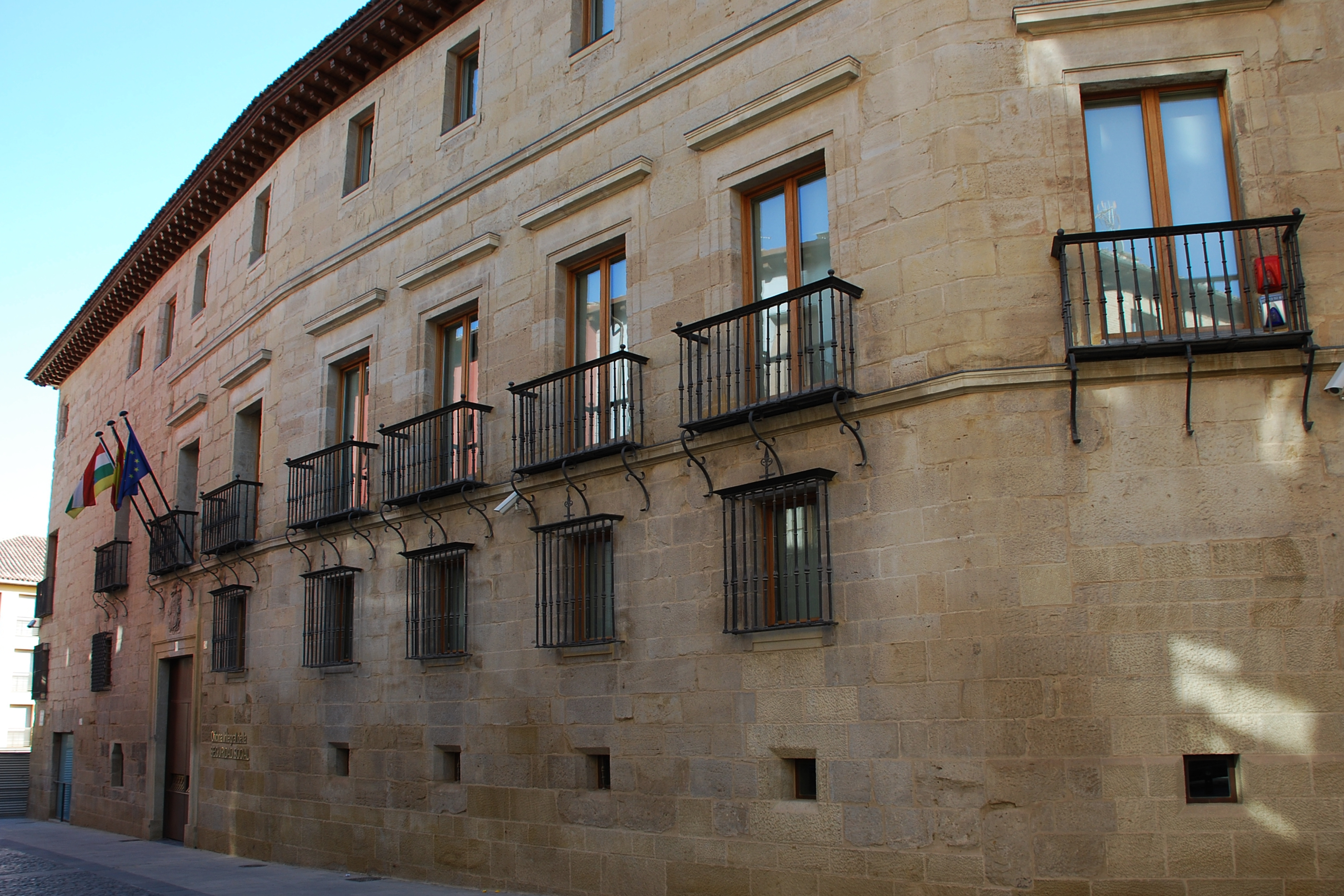 Palacio del Marqués de Monesterio en La Rioja, España.